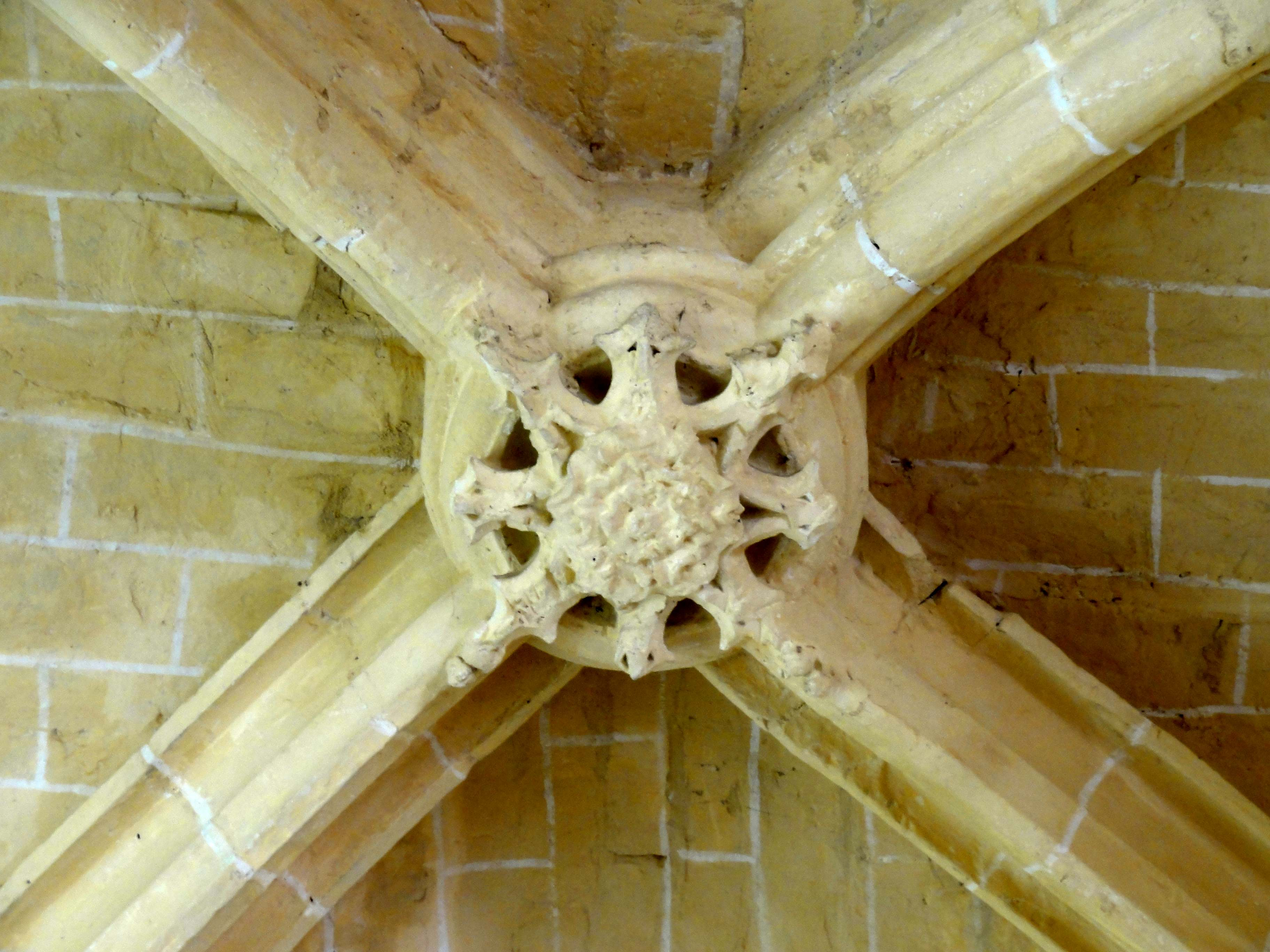 Clé de voûte - voir titre.